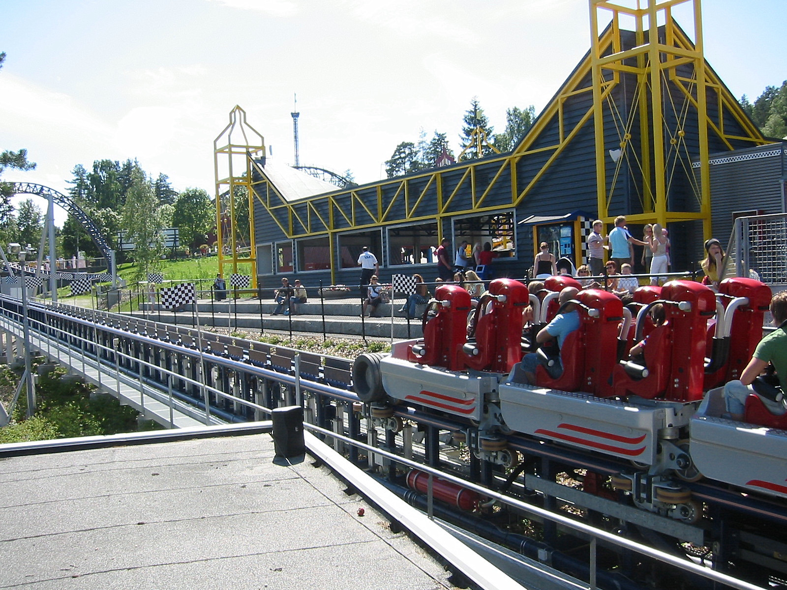 Speedmonster, Tusenfryd